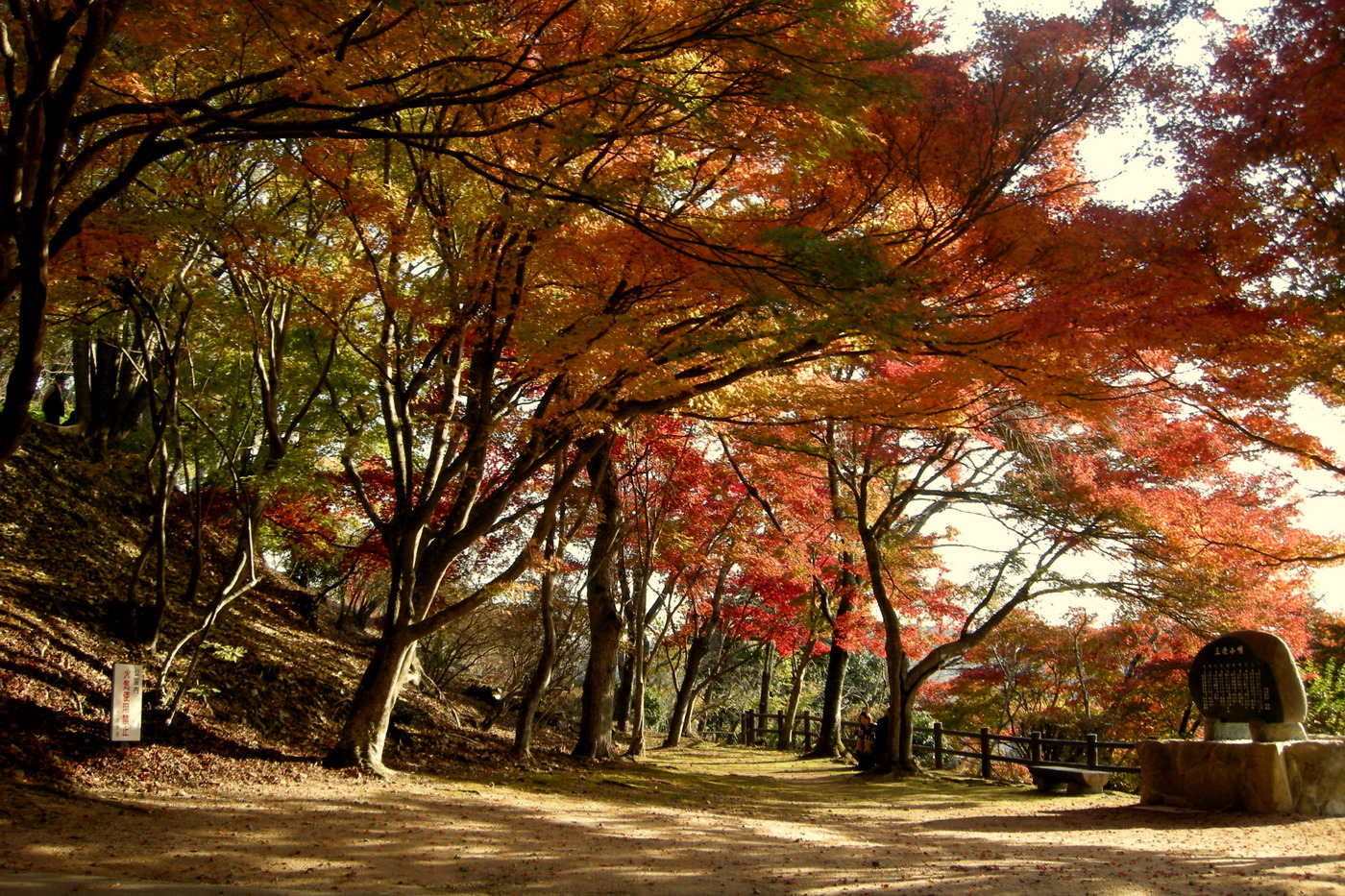 尾関山 Mt.Ozekiyama